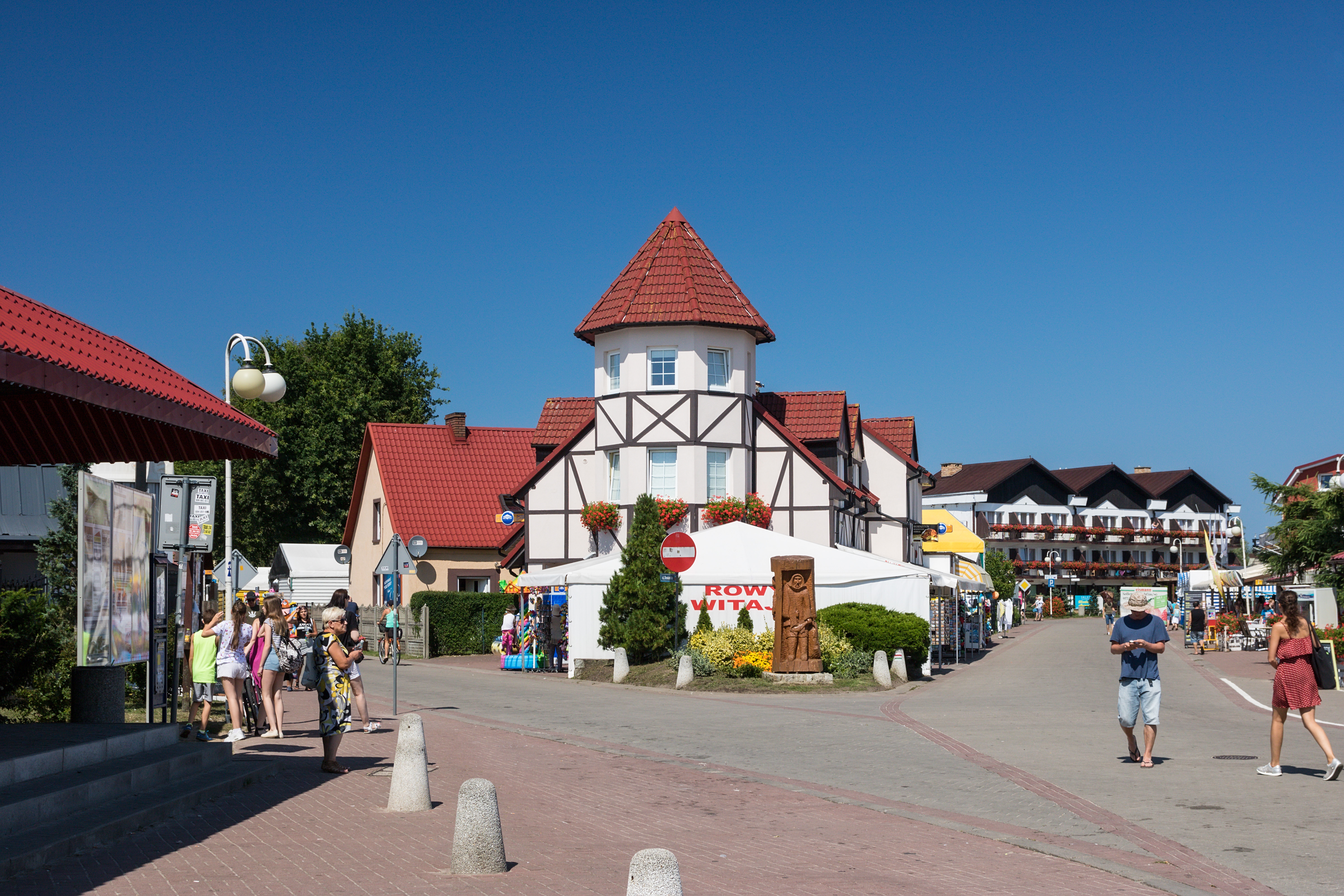 Centrum nadmorskiej miejscowości turystycznej Rowy